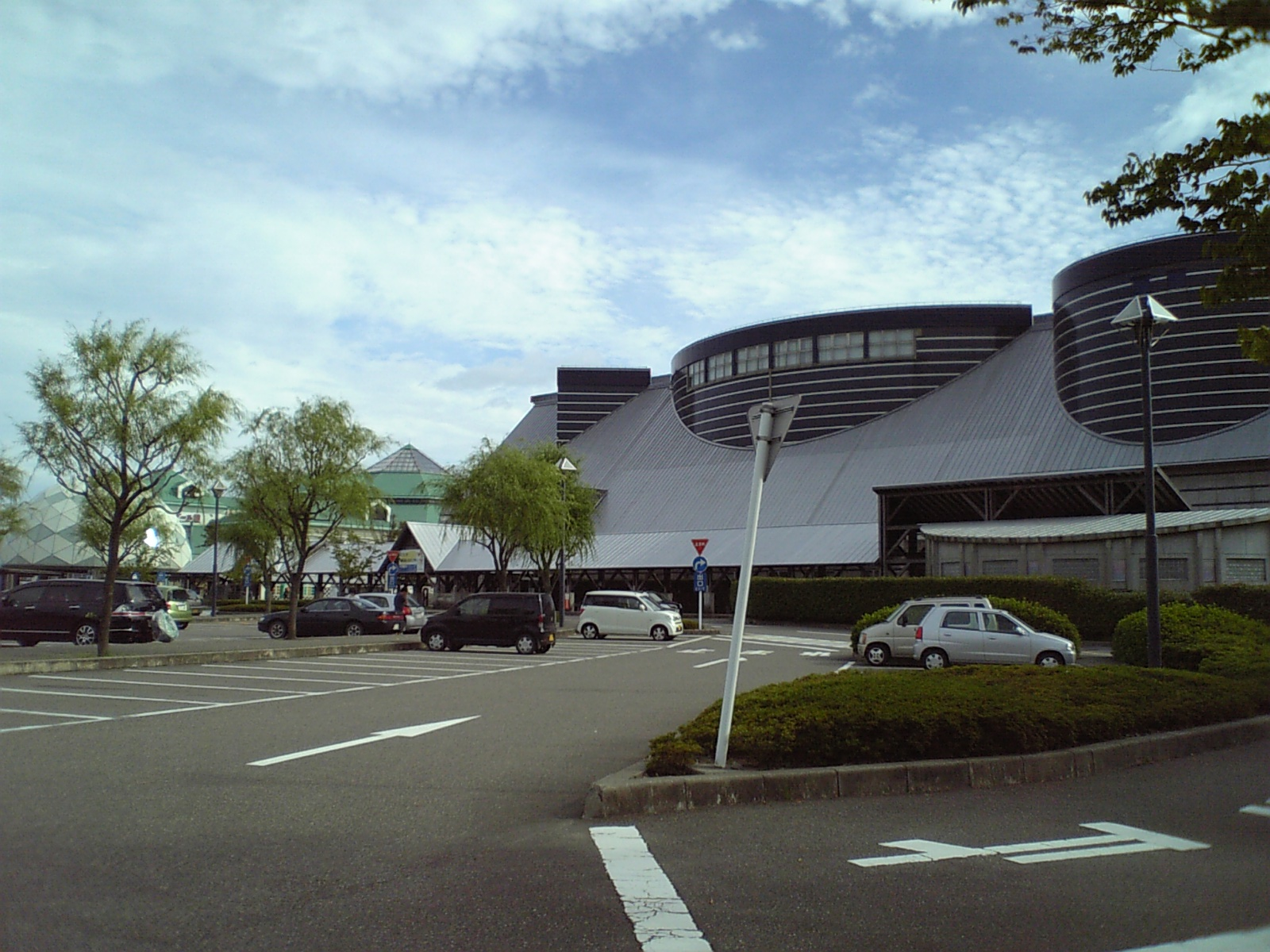 道の駅新潟ふるさと村。